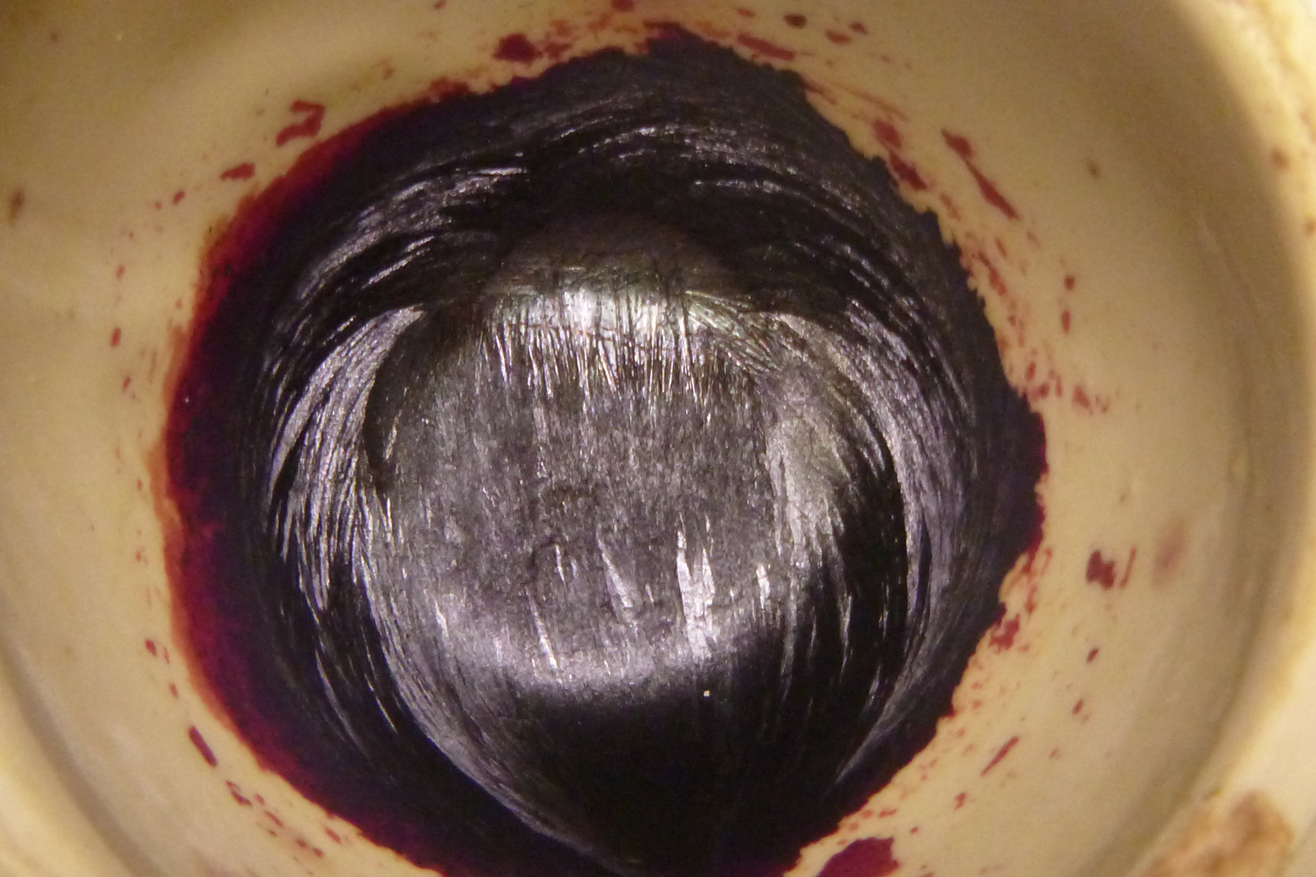 Твердый перманганат кальция, полученный из суспензии гидроксида кальция в воде и марганцового ангидрида. Solid calcium premanganate, prepared from suspension of calcium hydroxide and manganese heptoxide.